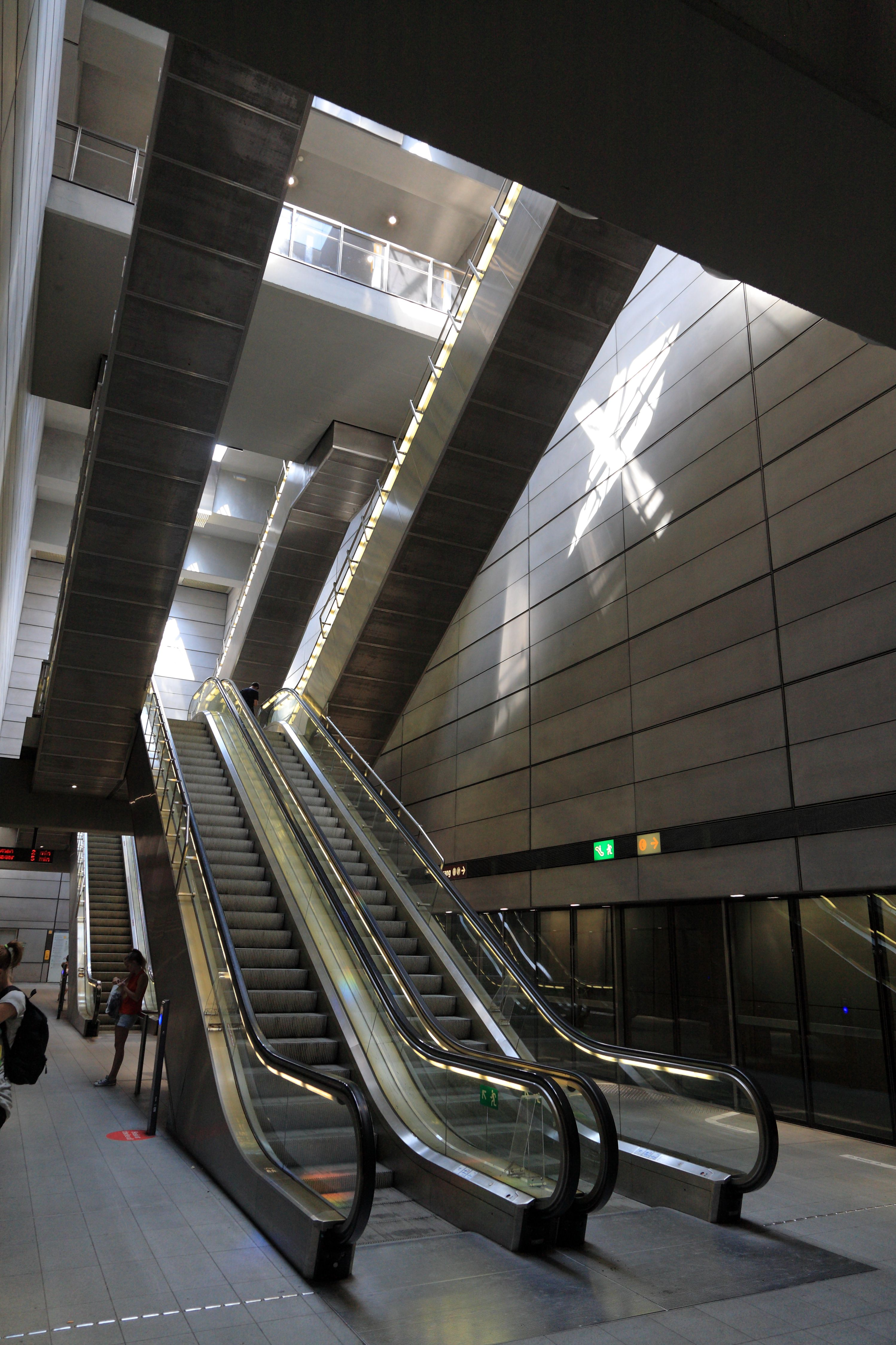 Rolltreppenzugange, getrennt nach Richtung. Die Tunnelbahnhöfe sind sehr einheitlich ausgeführt worden